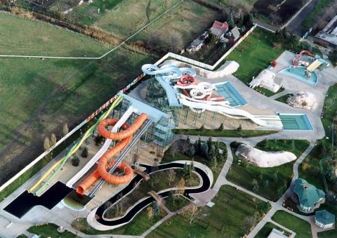 Hajdúszoboszló, hungary, aerialphotography